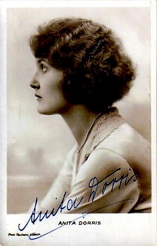 Autogrammkarte